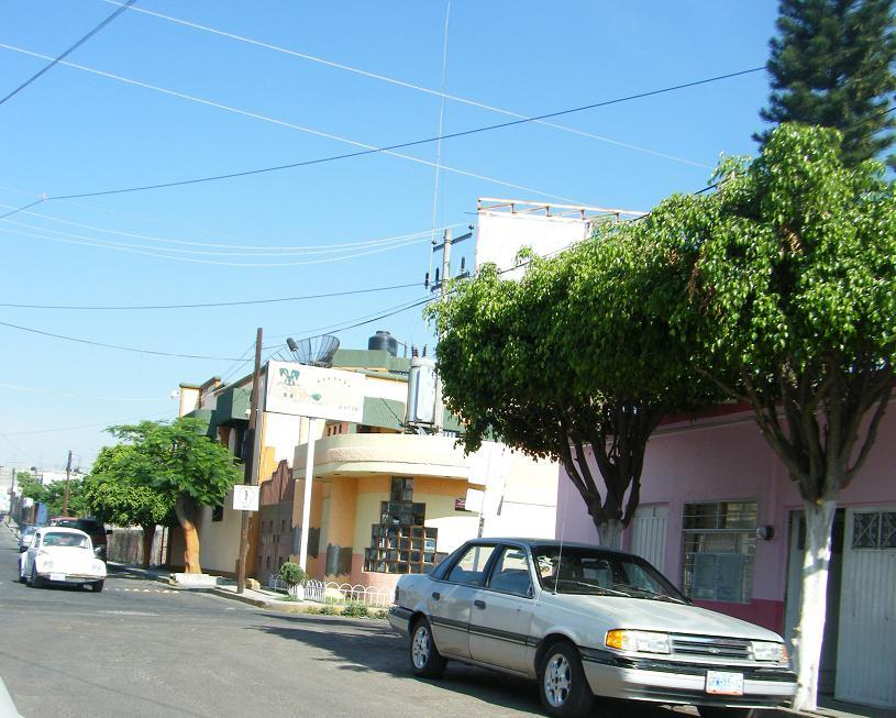 Calle Mina en el barrio de La Loma en Uriangato